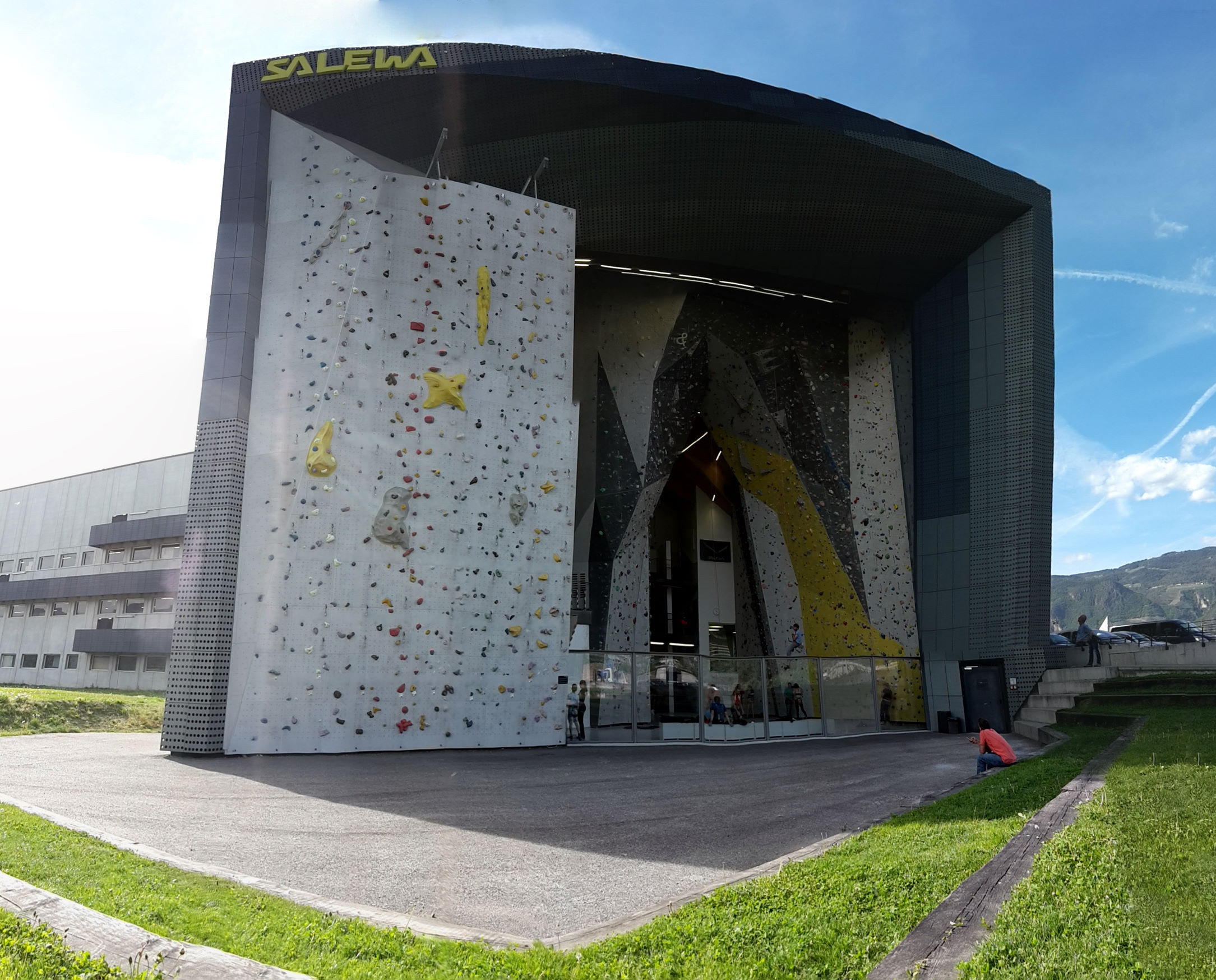 Edificio Salewa